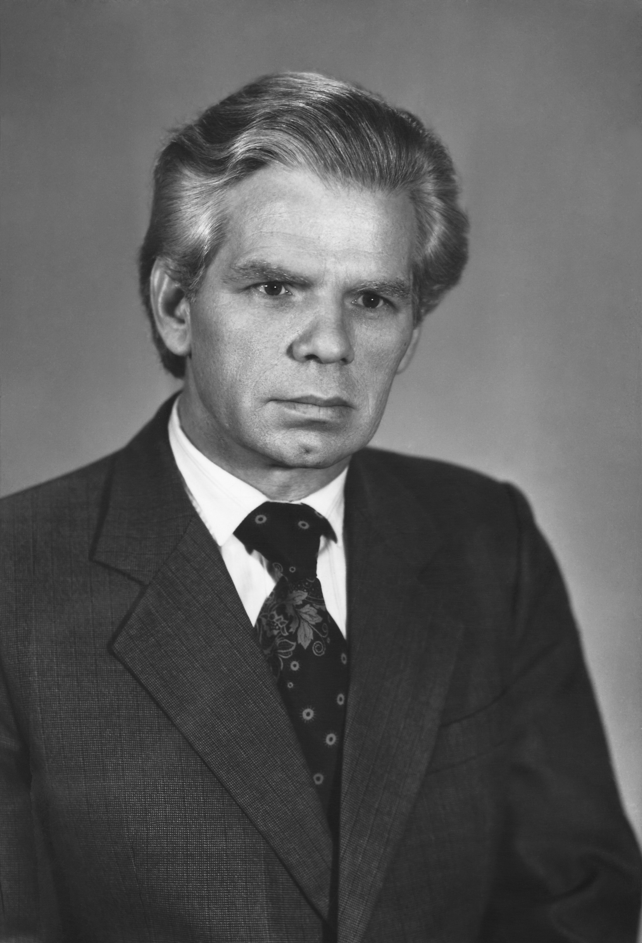 Сучасний український письменник, журналіст Греба Василь Михайлович